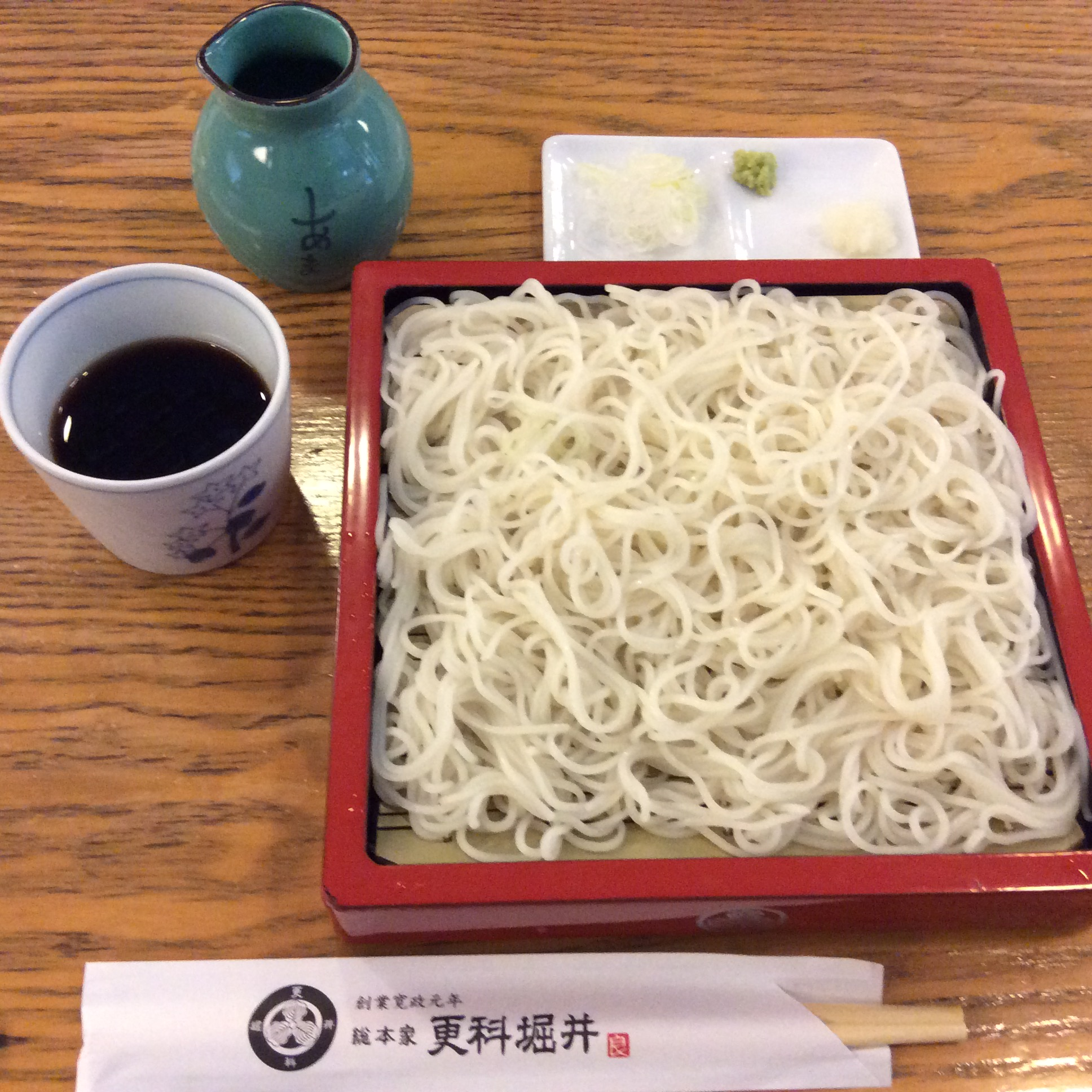 総本家 更科堀井